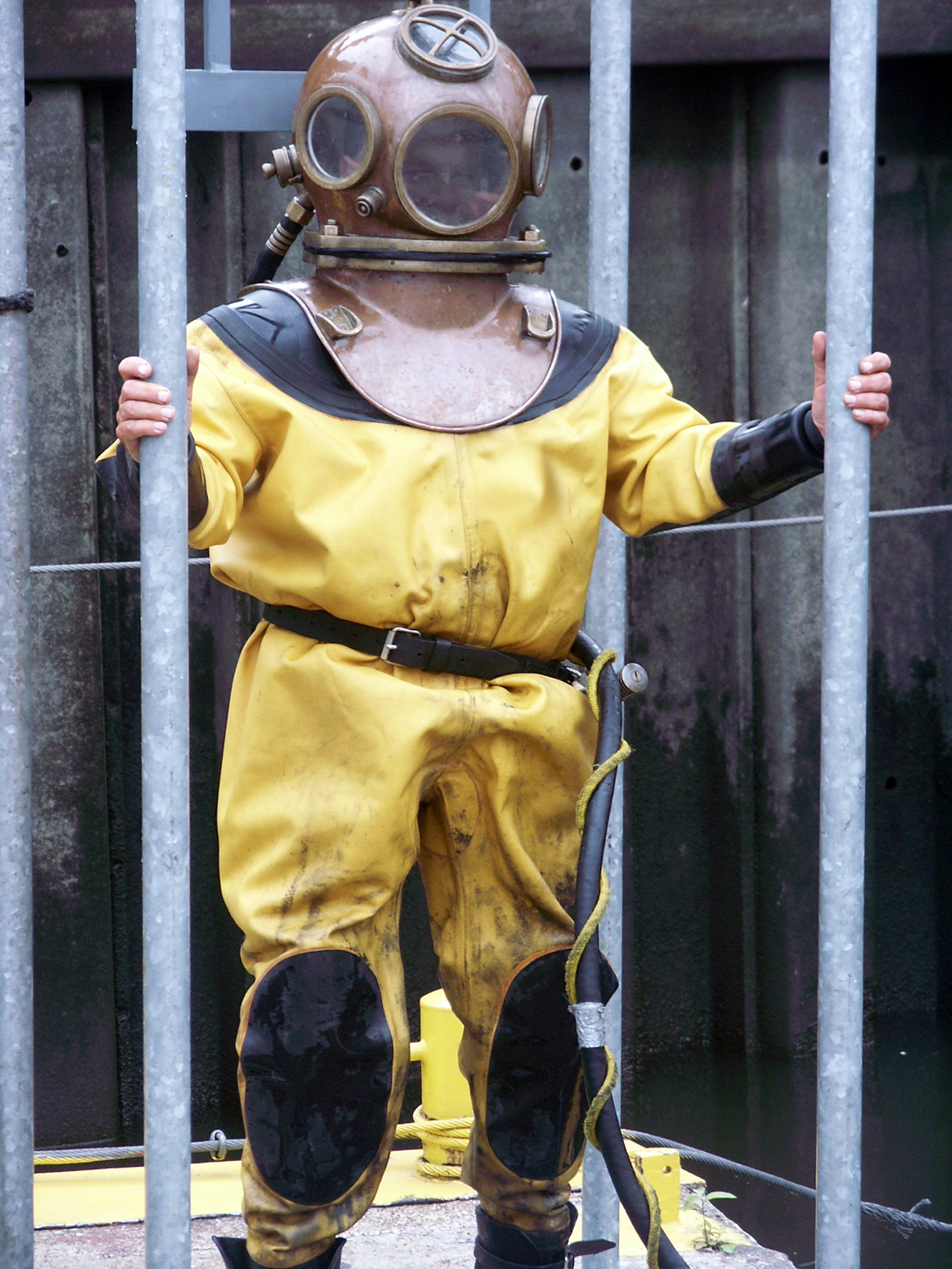 Hafentaucher im Hamburger Hafen